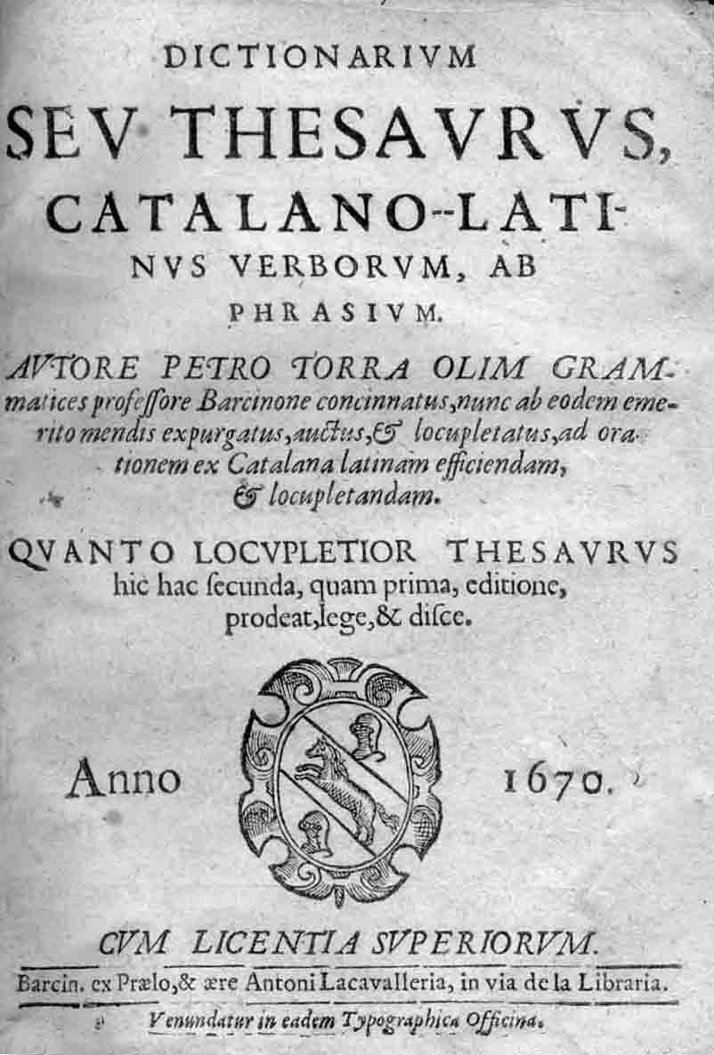 Portada del Tesaurus Catalano Latinus de Pere Torra